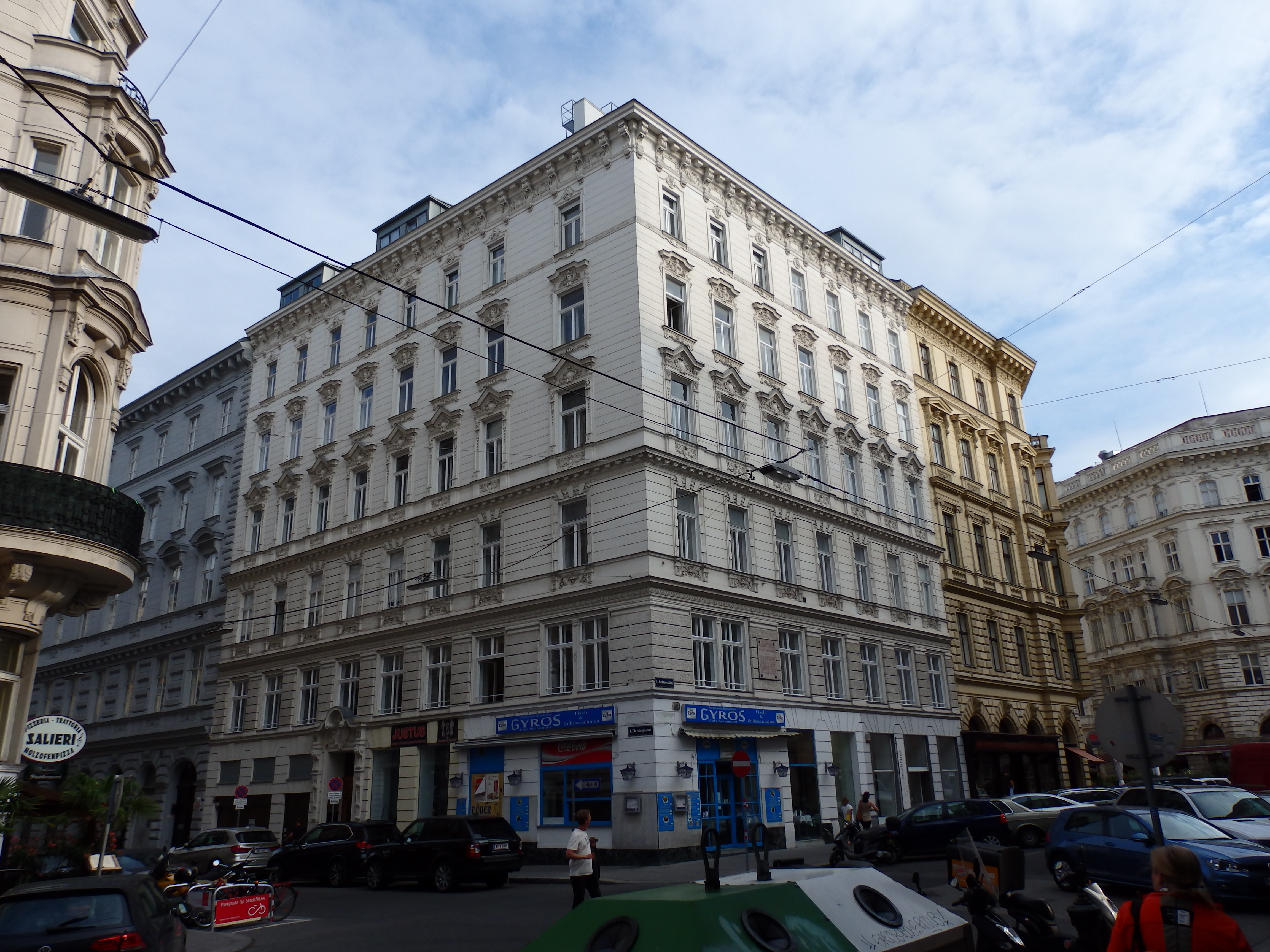 Wohnhaus (1892) von Carl Quidenus, Fichtegasse 2, Wien-Innere Stadt